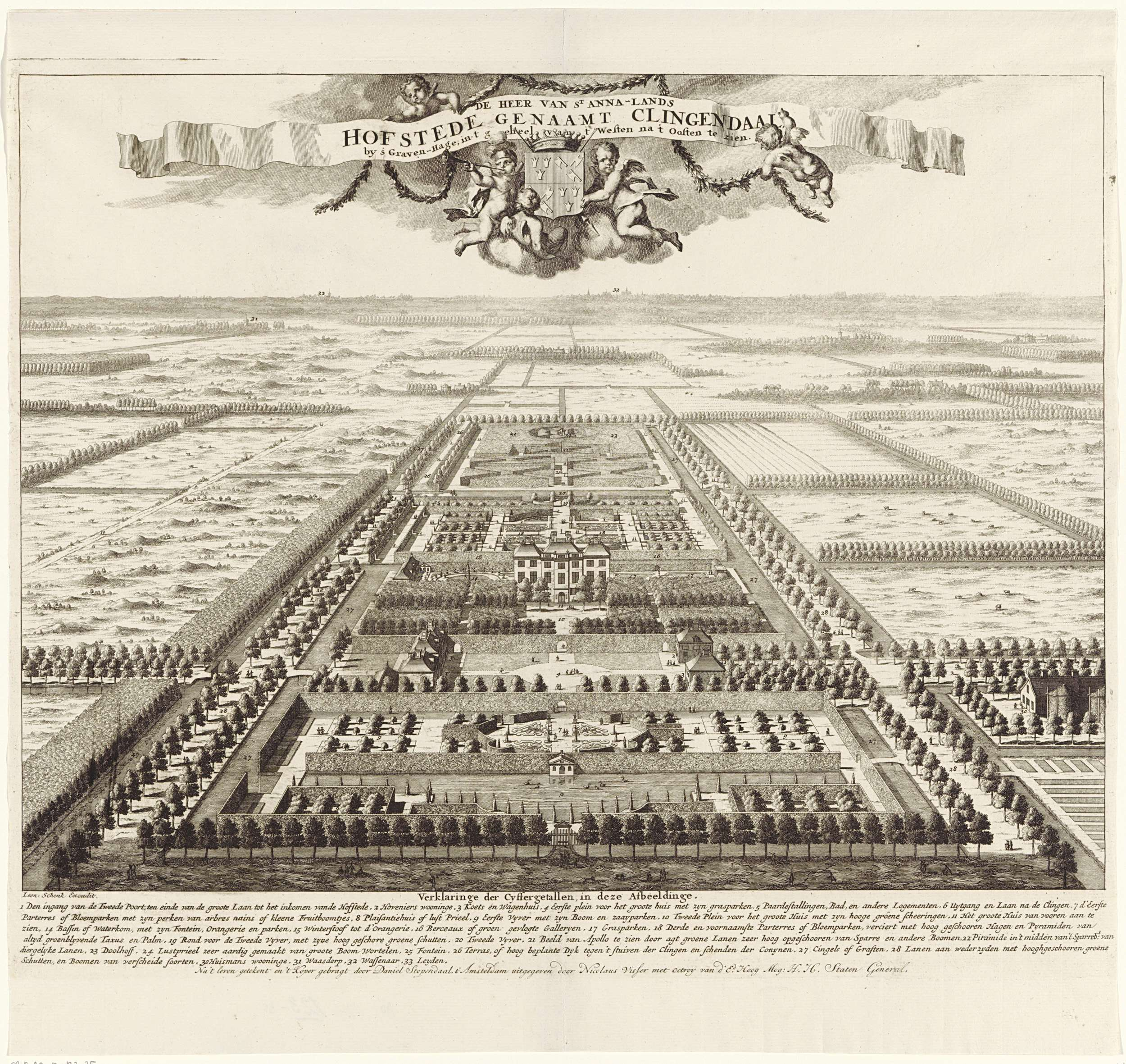 Gezicht op landgoed Clingendael in vogelvlucht. Aan de horizon Wassenaar en Leiden. Midden boven een door putti geflankeerde wimpel en het wapenschild van de eigenaar Philips Doublet. Middenonder in de marge een legenda.; Iconclasscode: 41A636; Iconclasscode: 48C14111; Iconclasscode: 92D1916; Iconclasscode: 46A122; ; print